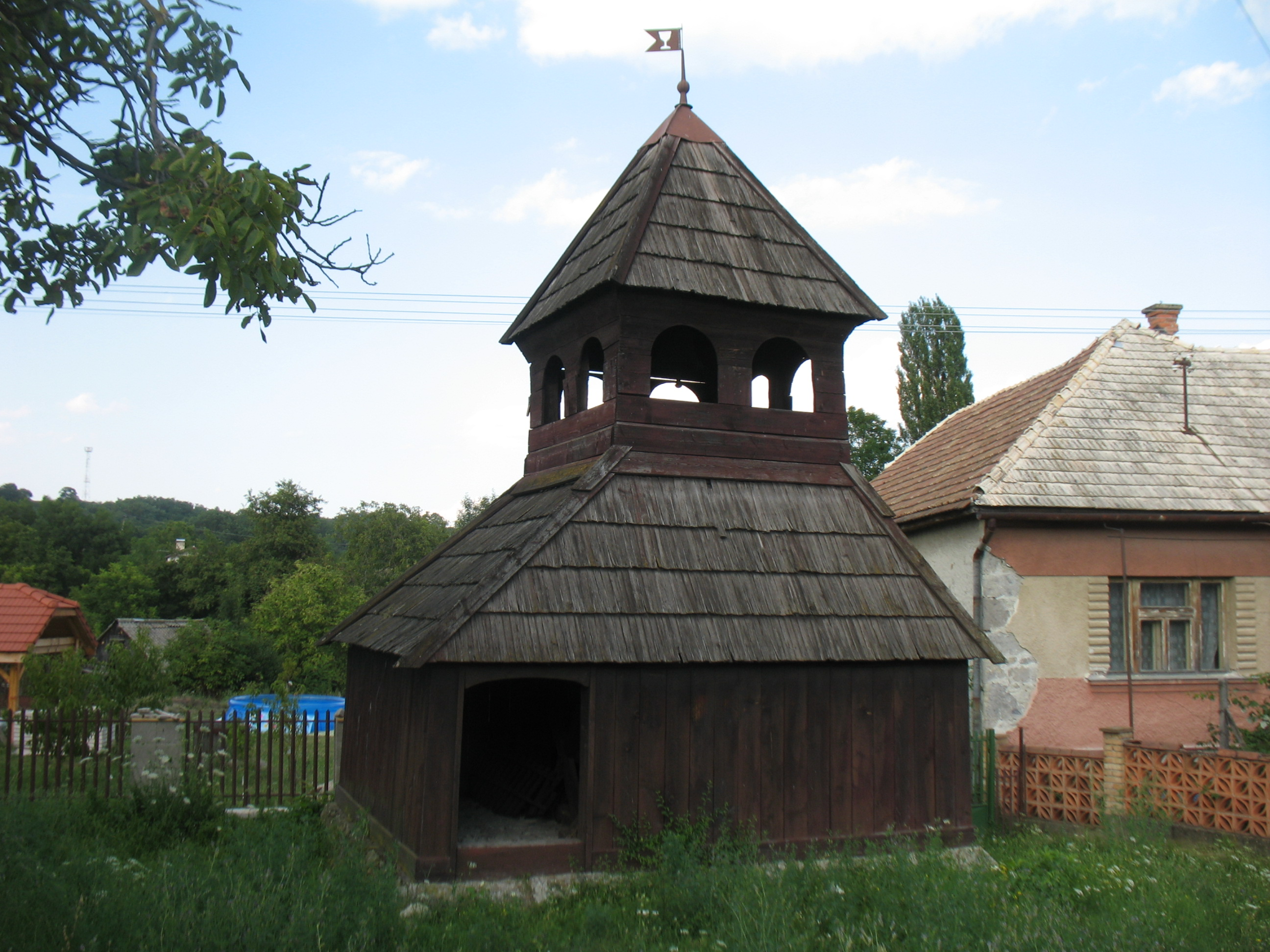 Fehérkút